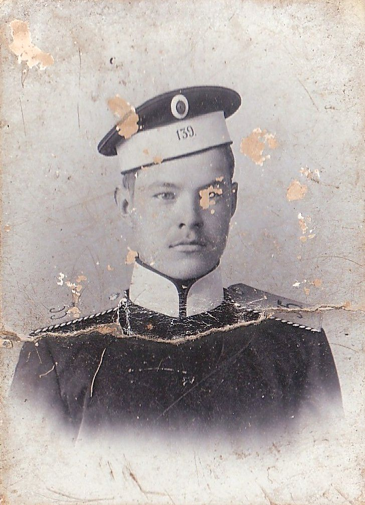 Моршанец, начало XX века.